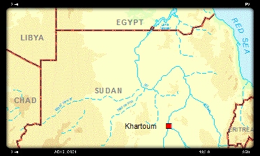 Wadi Howar, Flusslauf